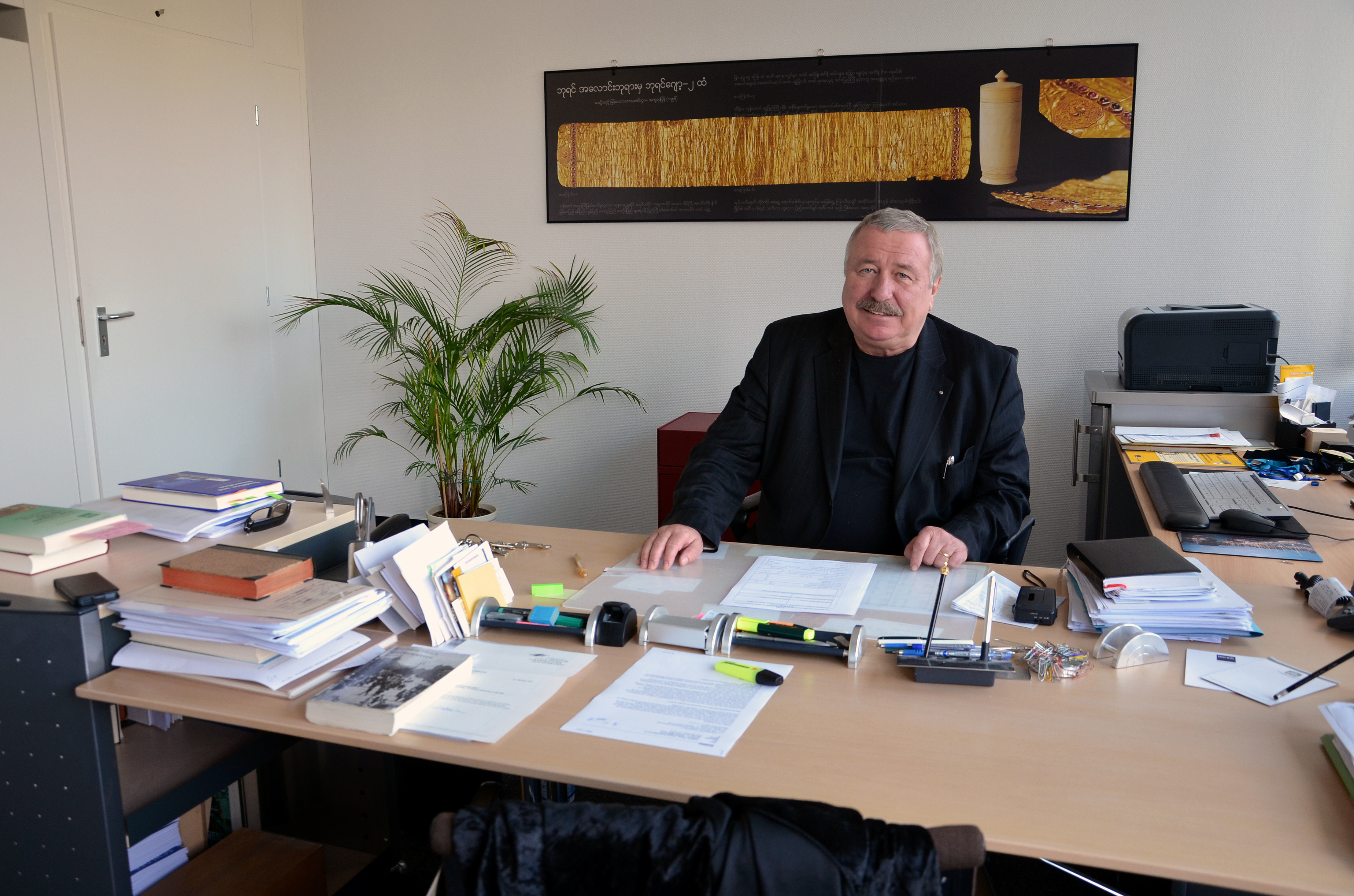 Der Autor, Herausgeber, und Bibliothekar Georg Ruppelt, Direktor der Gottfried Wilhelm Leibniz Bibliothek – Niedersächsische Landesbibliothek, hier am Schreibtisch in seinem Büro vor einem Druck des am 7. Mai 1756 von dem birmanischen König Alaungphaya an den englisch-hannoverschen König Georg II. versandten Goldenen Briefes. Der originale Brief auf purem Gold mit den Maßen 55 cm x 12 cm, besetzt mit 12 birmanischen Rubinen, ist weltweit einzigartig und wurde rund ein Viertel Jahrtausend nach seiner "Wiederentdeckung" für die Liste des UNESCO-Weltdokumentenerbes angemeldet ...